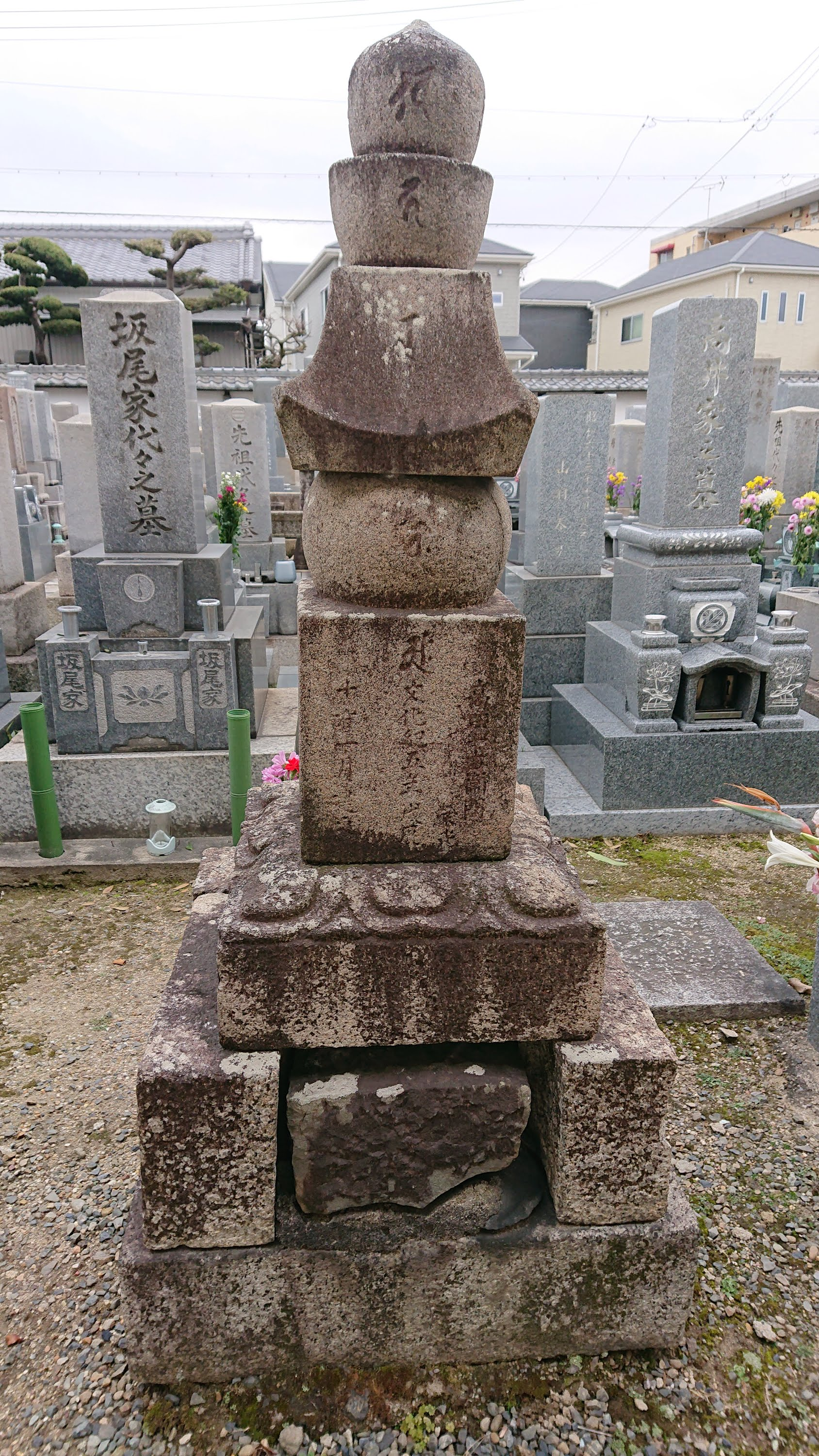 名古屋市西区上小田井の長善寺境内の高田太郎庵の墓